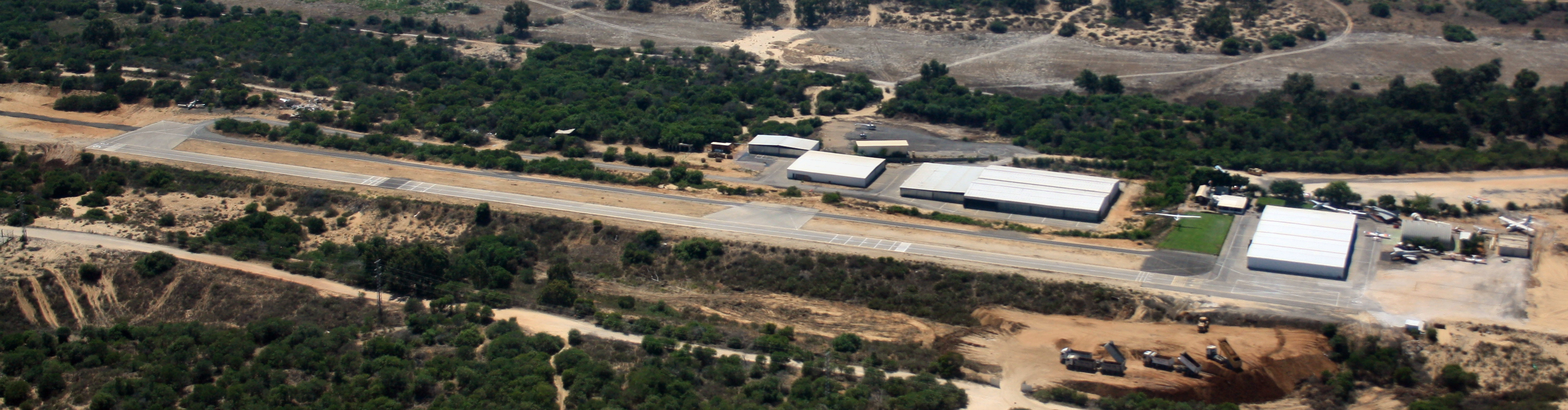 מנחת ראשון לציון.